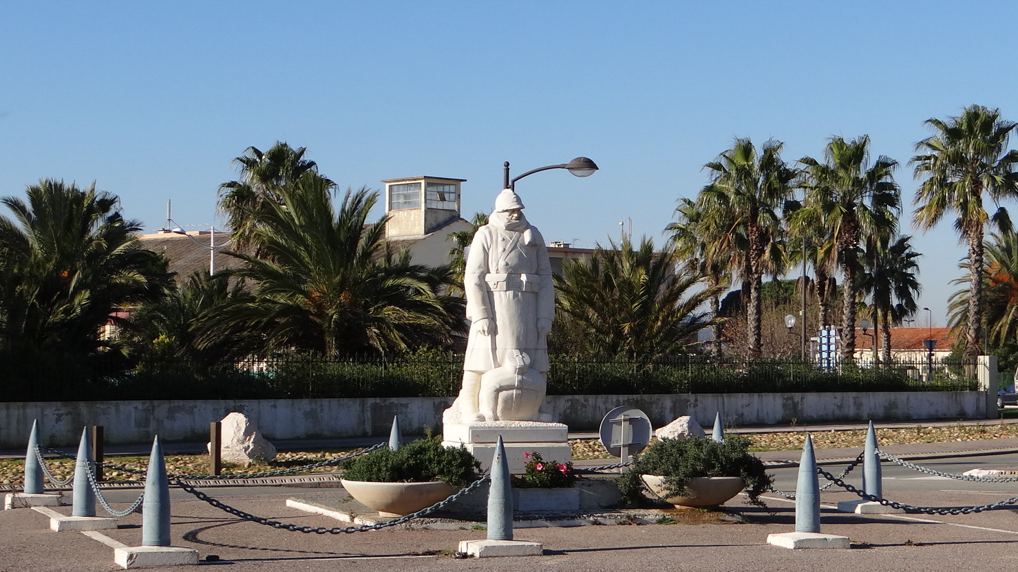 Base aéronavale Fréjus-Saint Raphaël